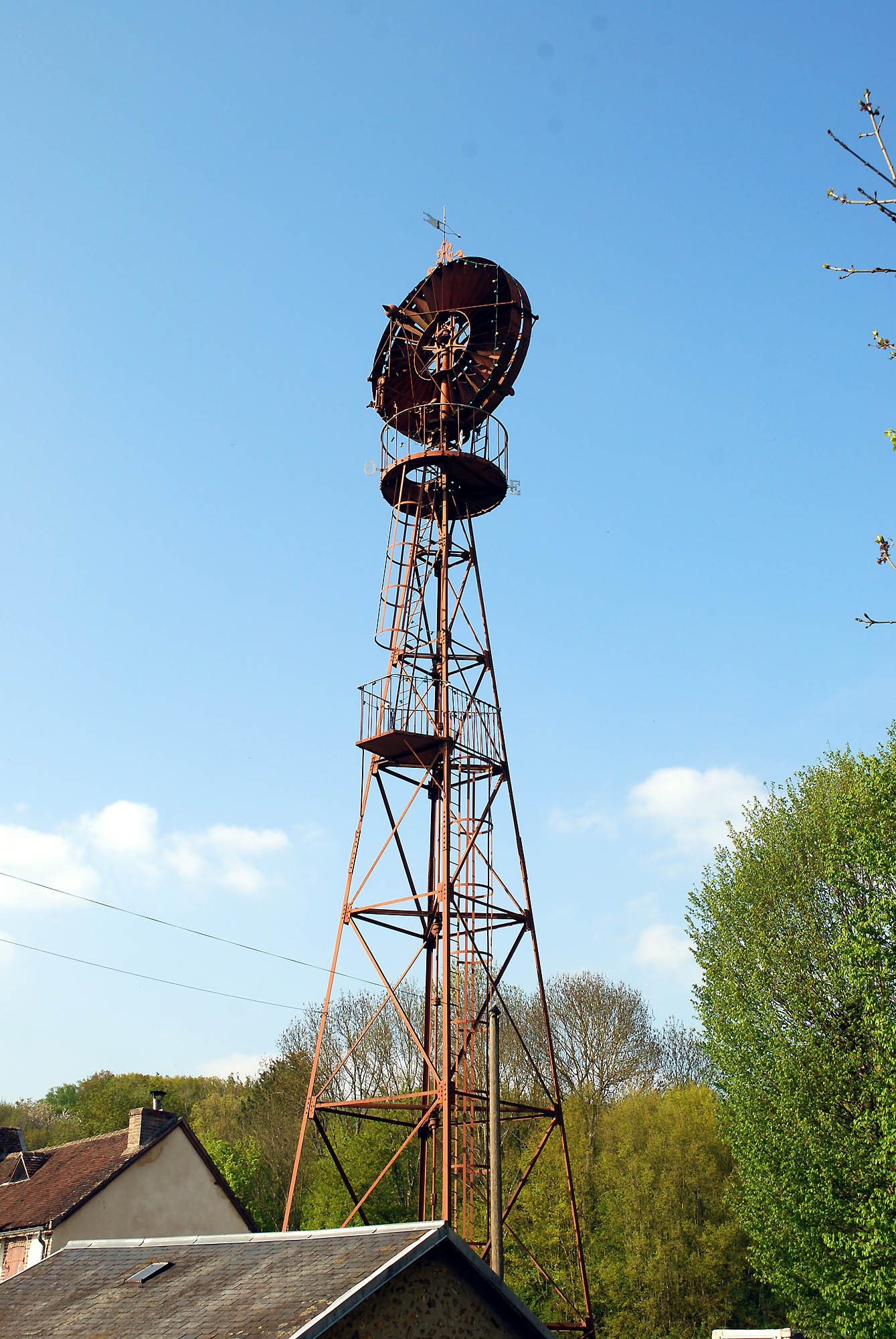 Eolienne de Vaudeurs, de type Bollé (Yonne France)